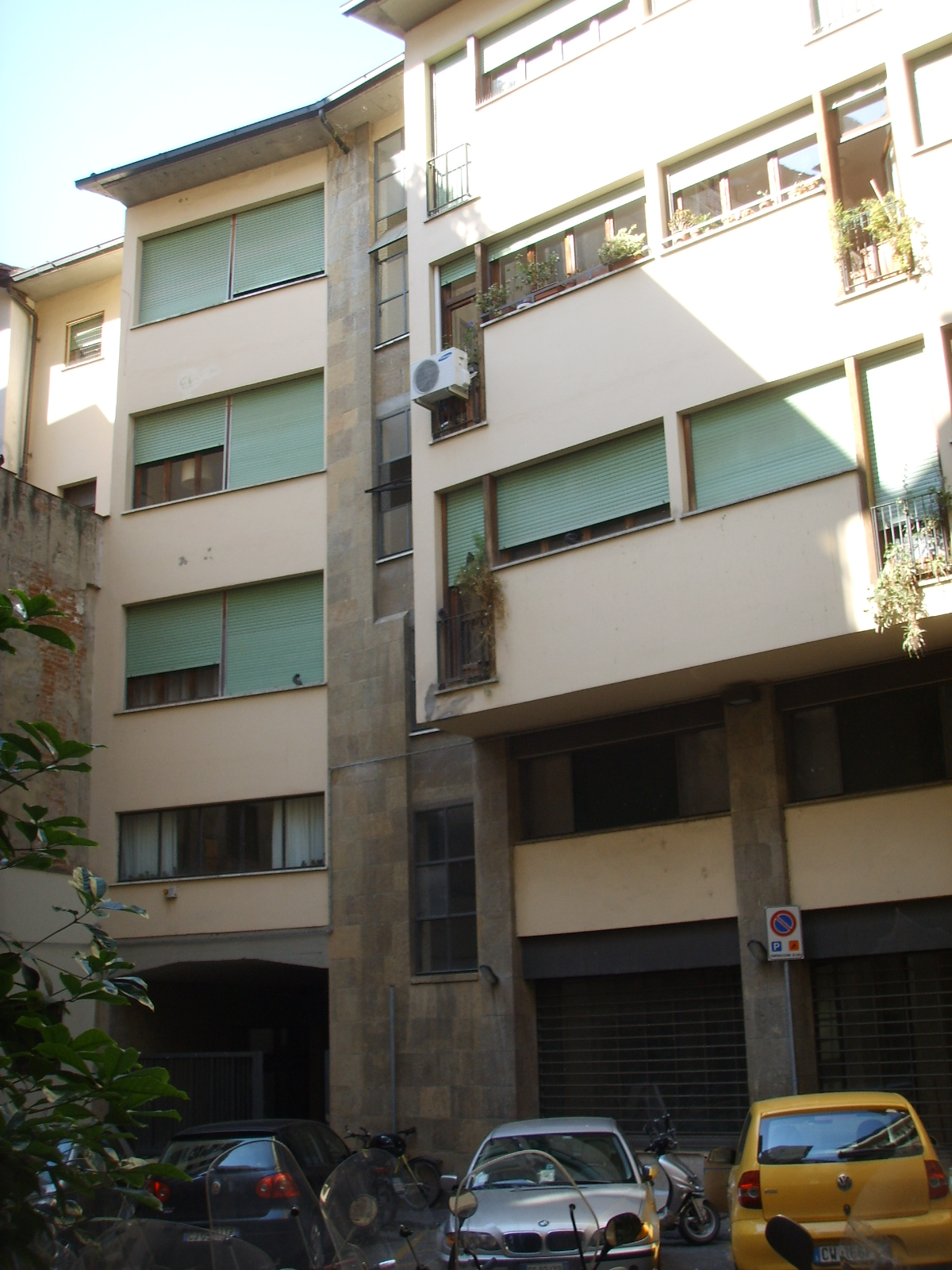 Casa in via dello sprone